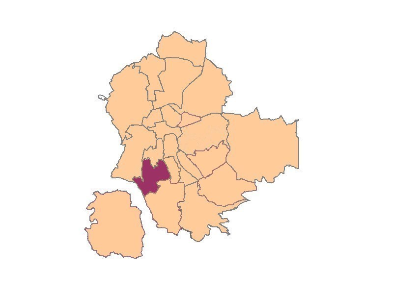 plans de saint-etienne quartier de la Cotonne